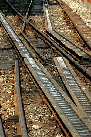 Eine Zahnradweiche der Rigibahn